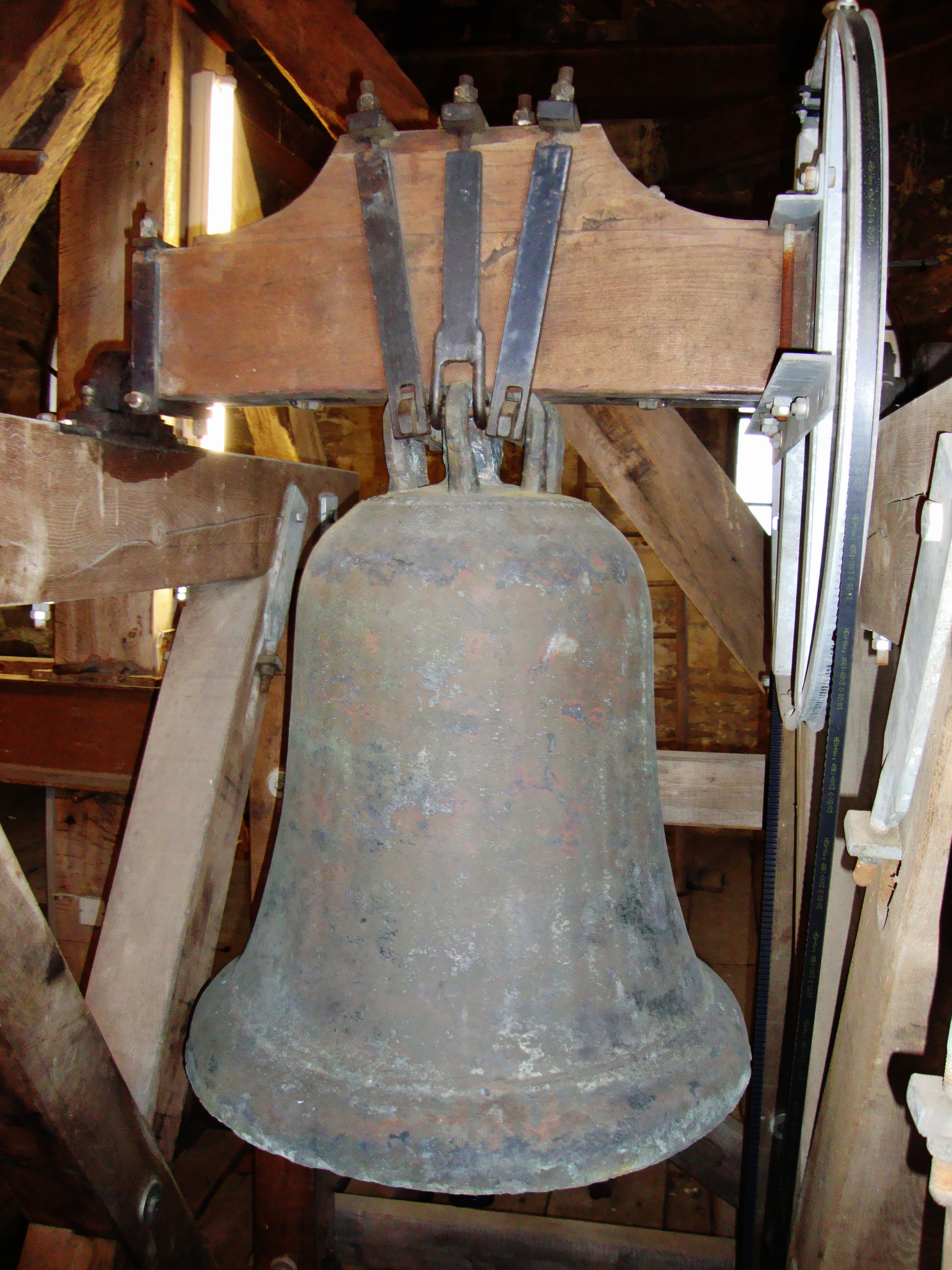 Herford, Münster: Kalandsglocke aus der Zeit um 1200.